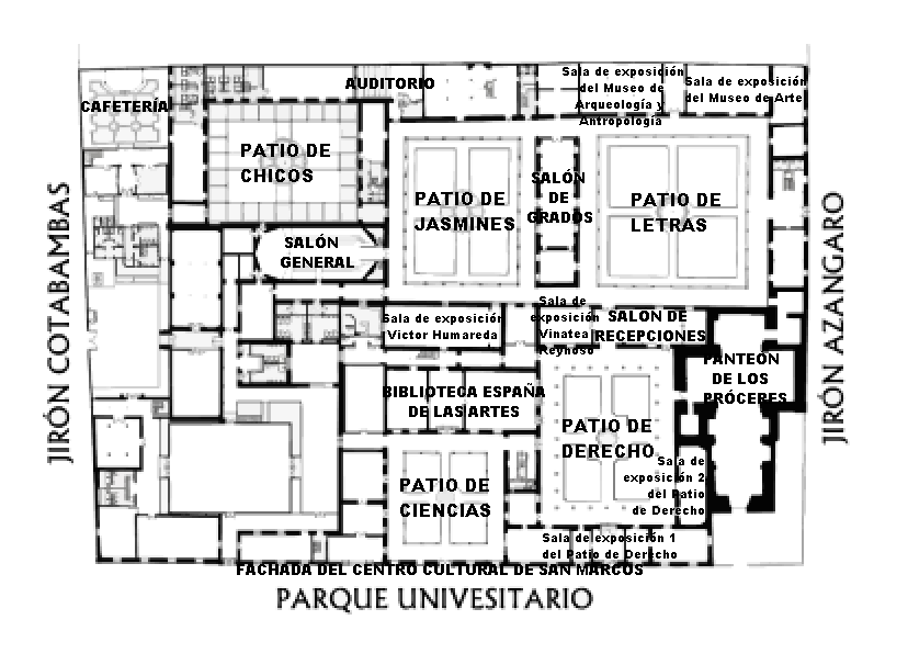 Mapa de la Casona de San Marcos, actual Centro Cultural de la Universidad Nacional Mayor de San Marcos.